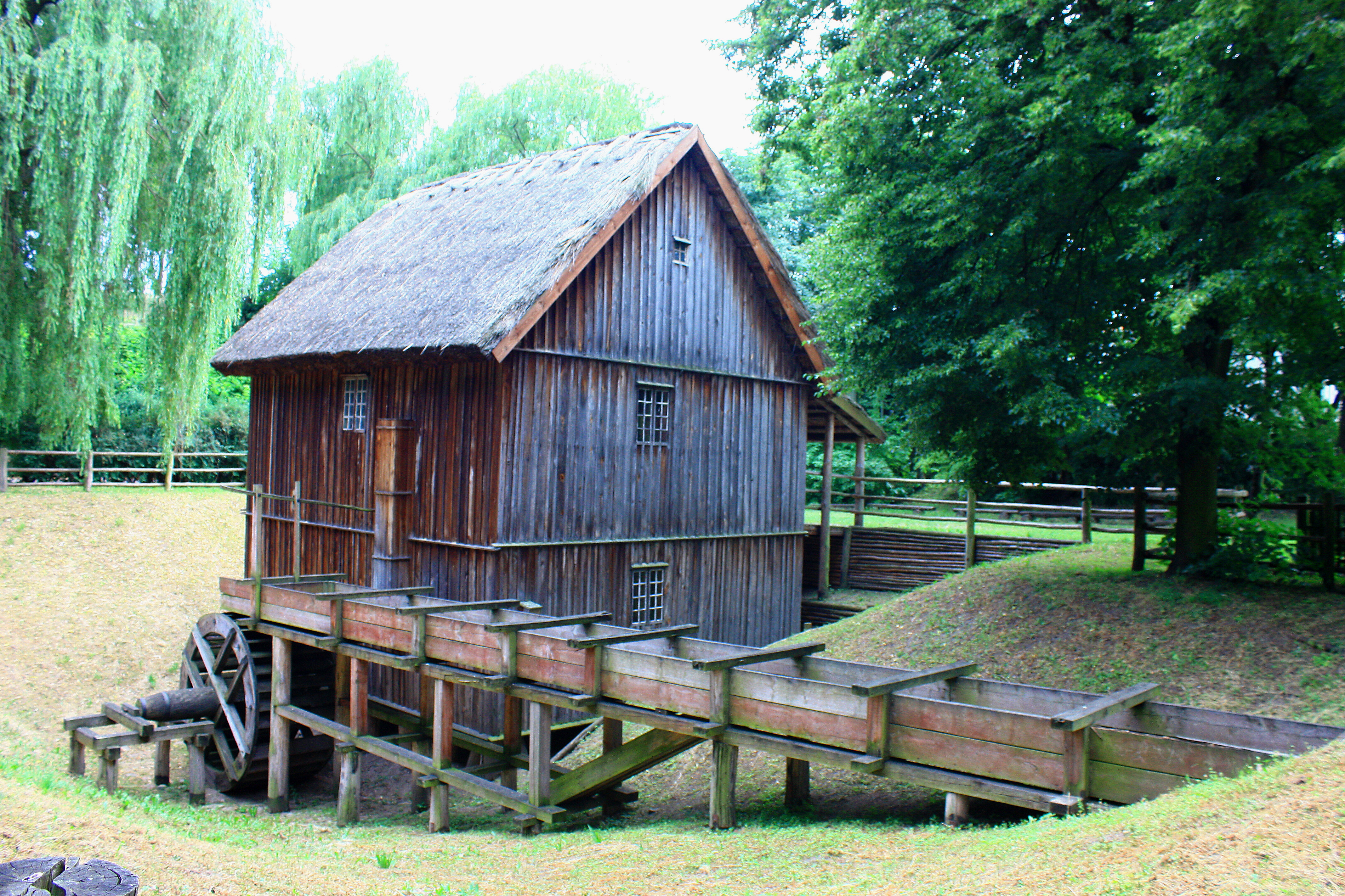 Toruń - Park Etnograficzny - młyn wodny, pocz. XX w., Strzygi, ziemia dobrzyńska